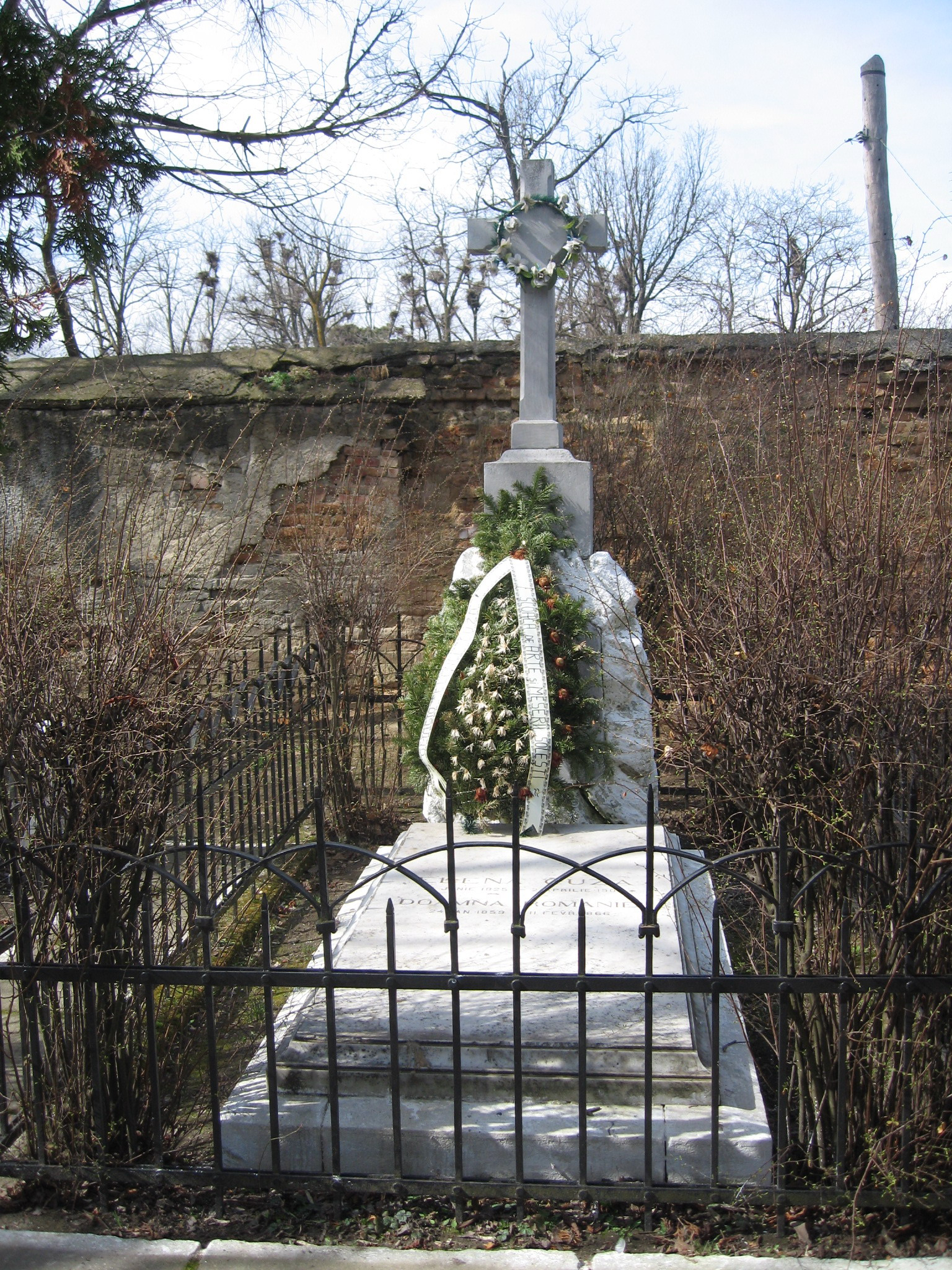 Conacul din Soleşti 01